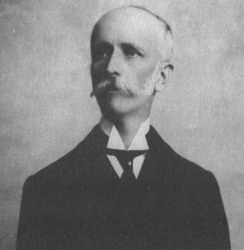 José Yves Limantour, Scretario de Hacienda y Crédito Público